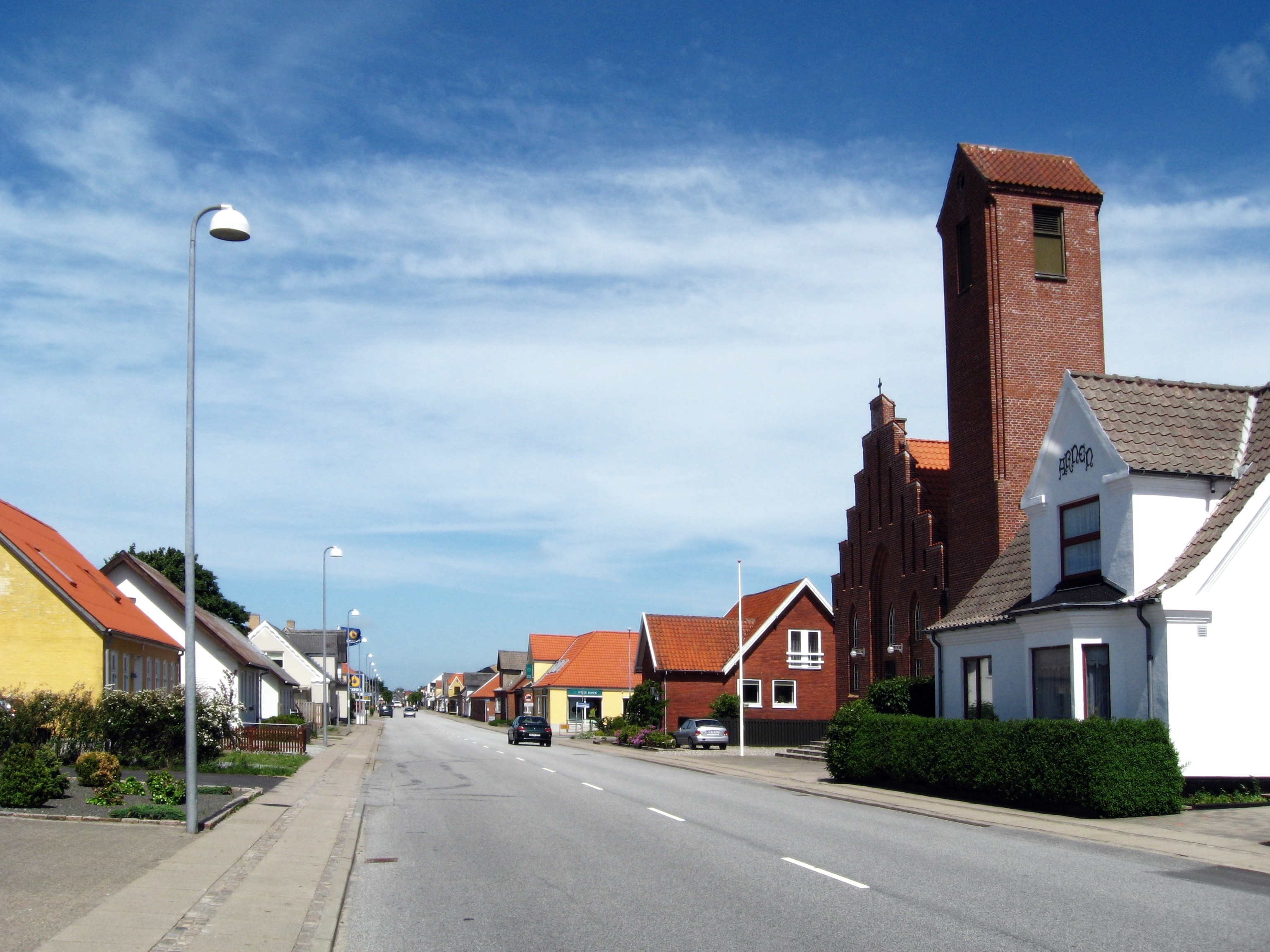 Bredgade i Pandrup + Baptistkirken